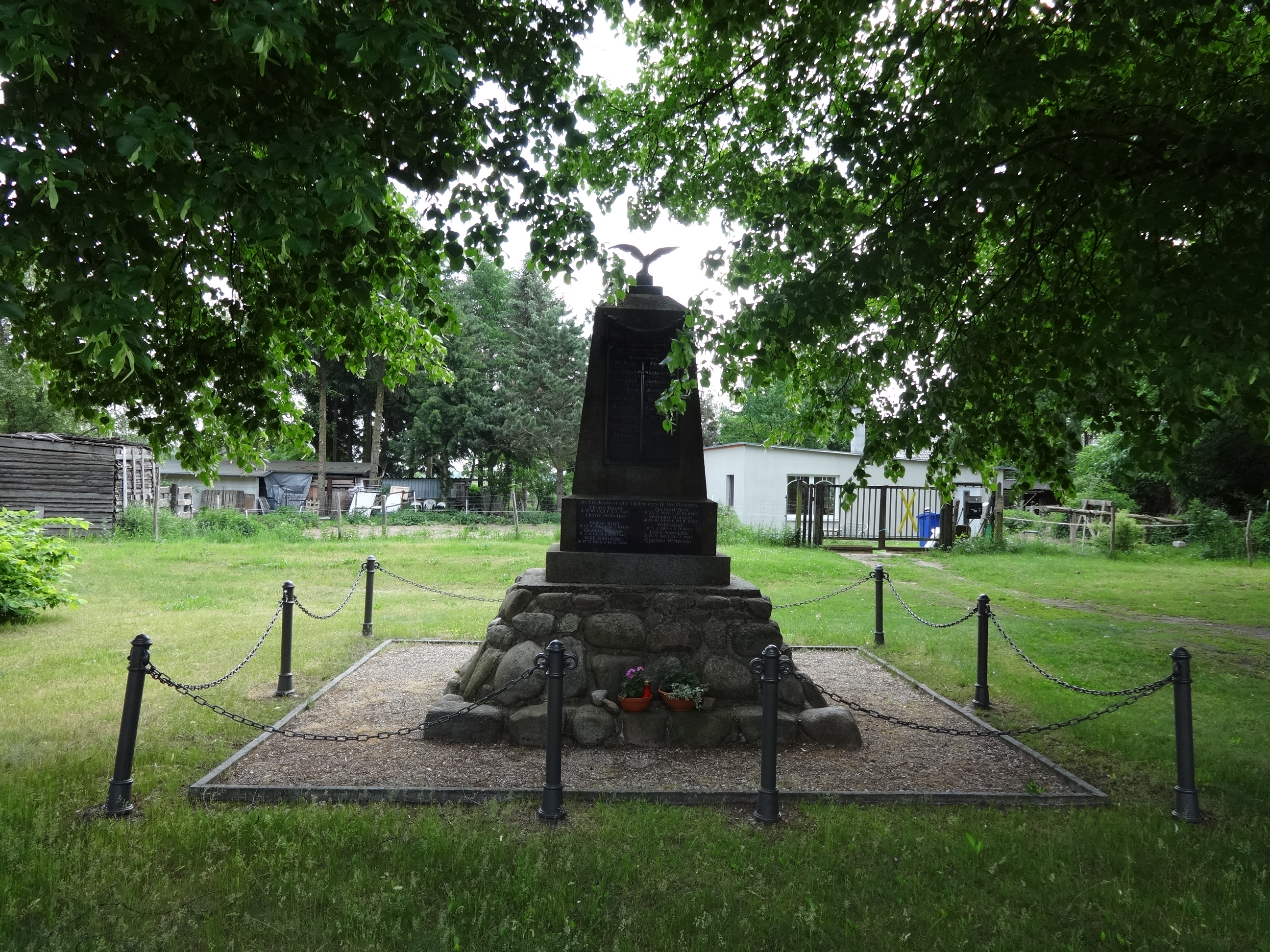 Denkmal für die Gefallenen der Weltkriege in Hermsdorf, ein Ortsteil von Münchehofe in Brandenburg